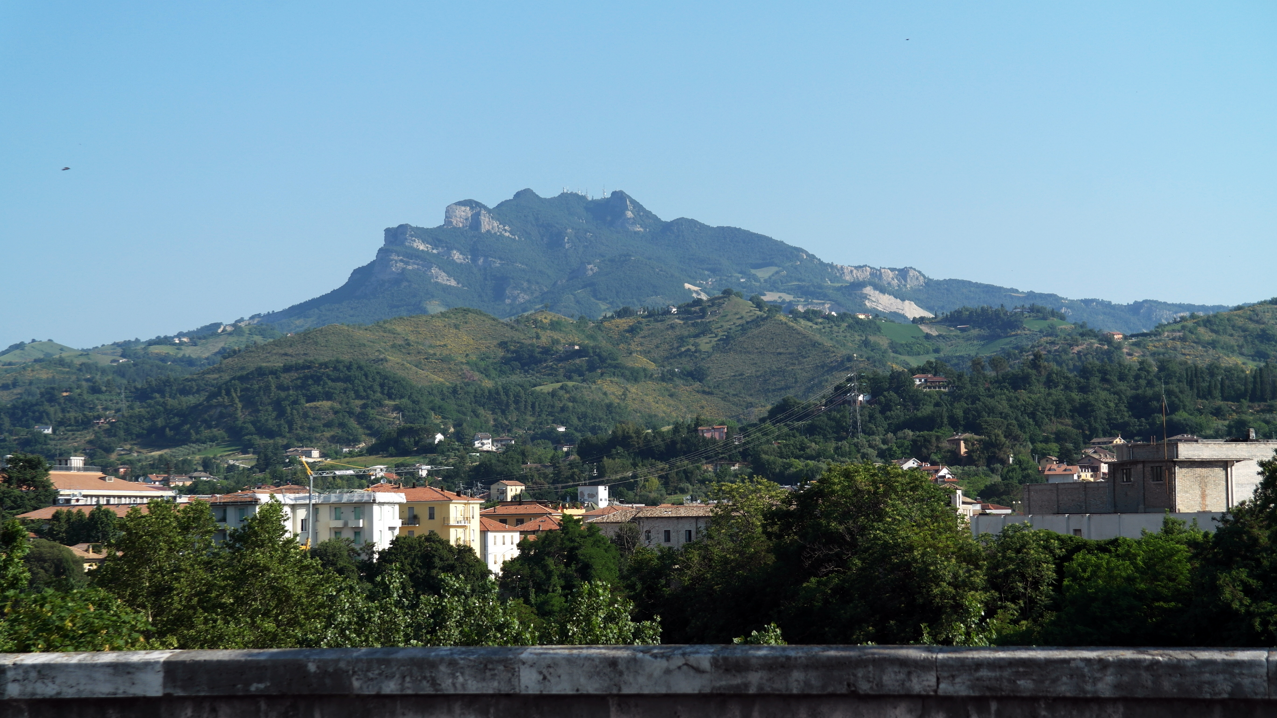 63100 Ascoli Piceno, Province of Ascoli Piceno, Italy